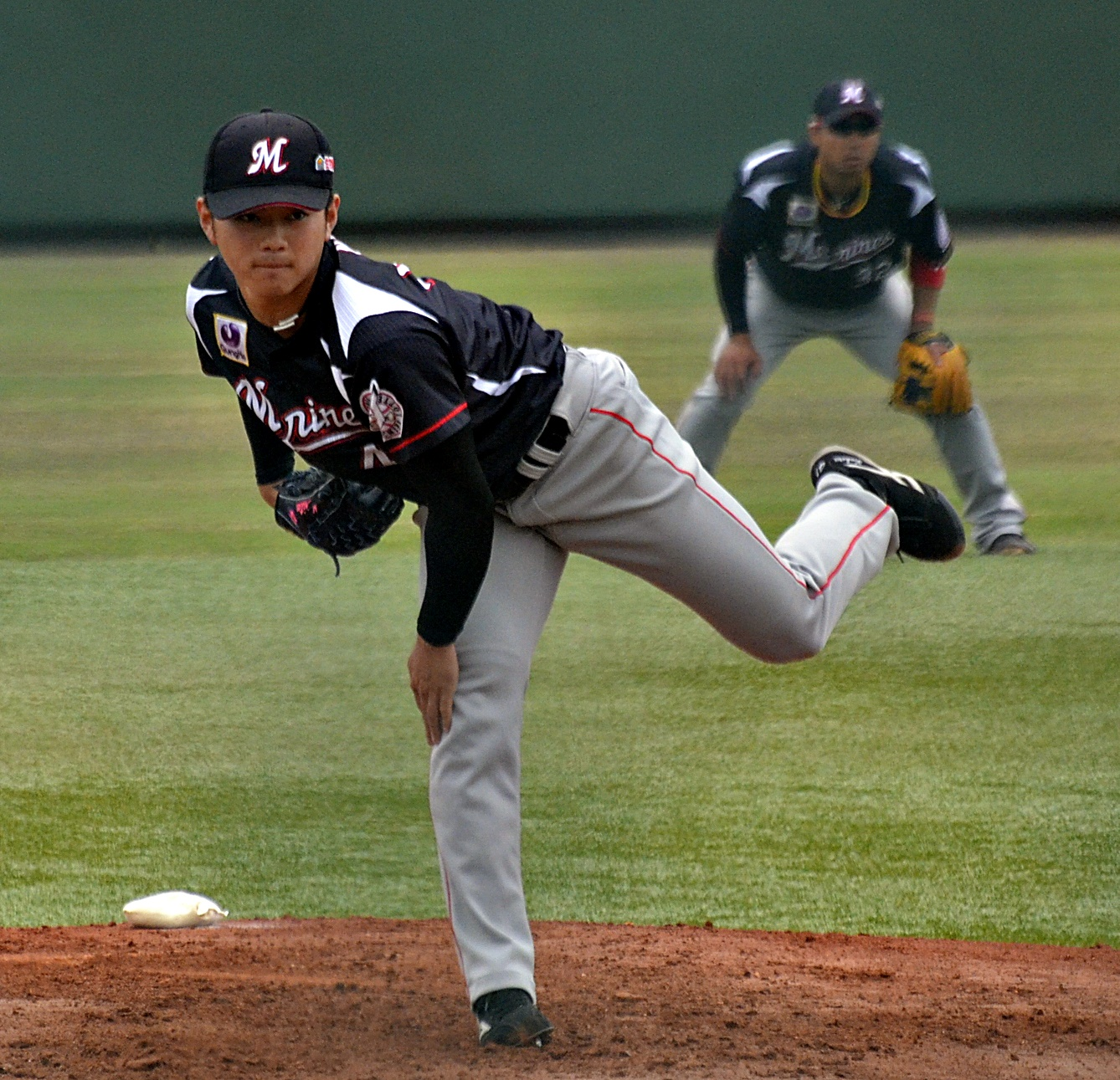 千葉ロッテマリーンズの成田翔投手